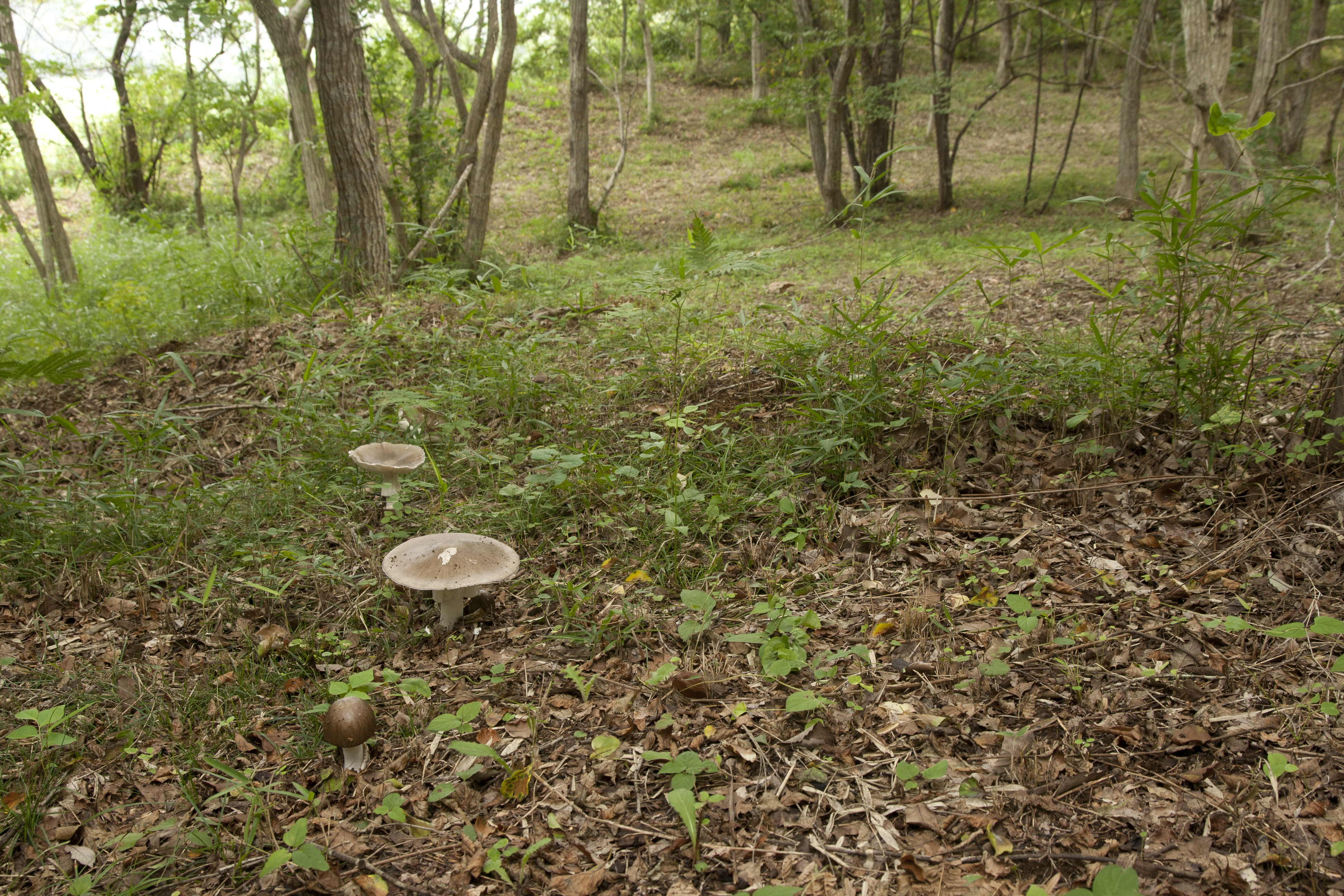 テングタケ属 コテングタケモドキ (学名:Amanita pseudoporphyria)